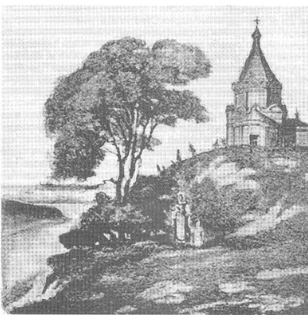 Церковь Спаса Преображения в селе Спас (Тушино).Литография конца XIX века